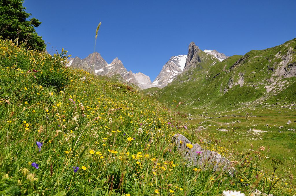 En montagne, des expérimentations sont menées depuis quelques années pour utiliser des semences locales, récoltées dans la zone géographique des espaces à revégétaliser et dans des milieux correspondant aux objectifs de revégétalisation.